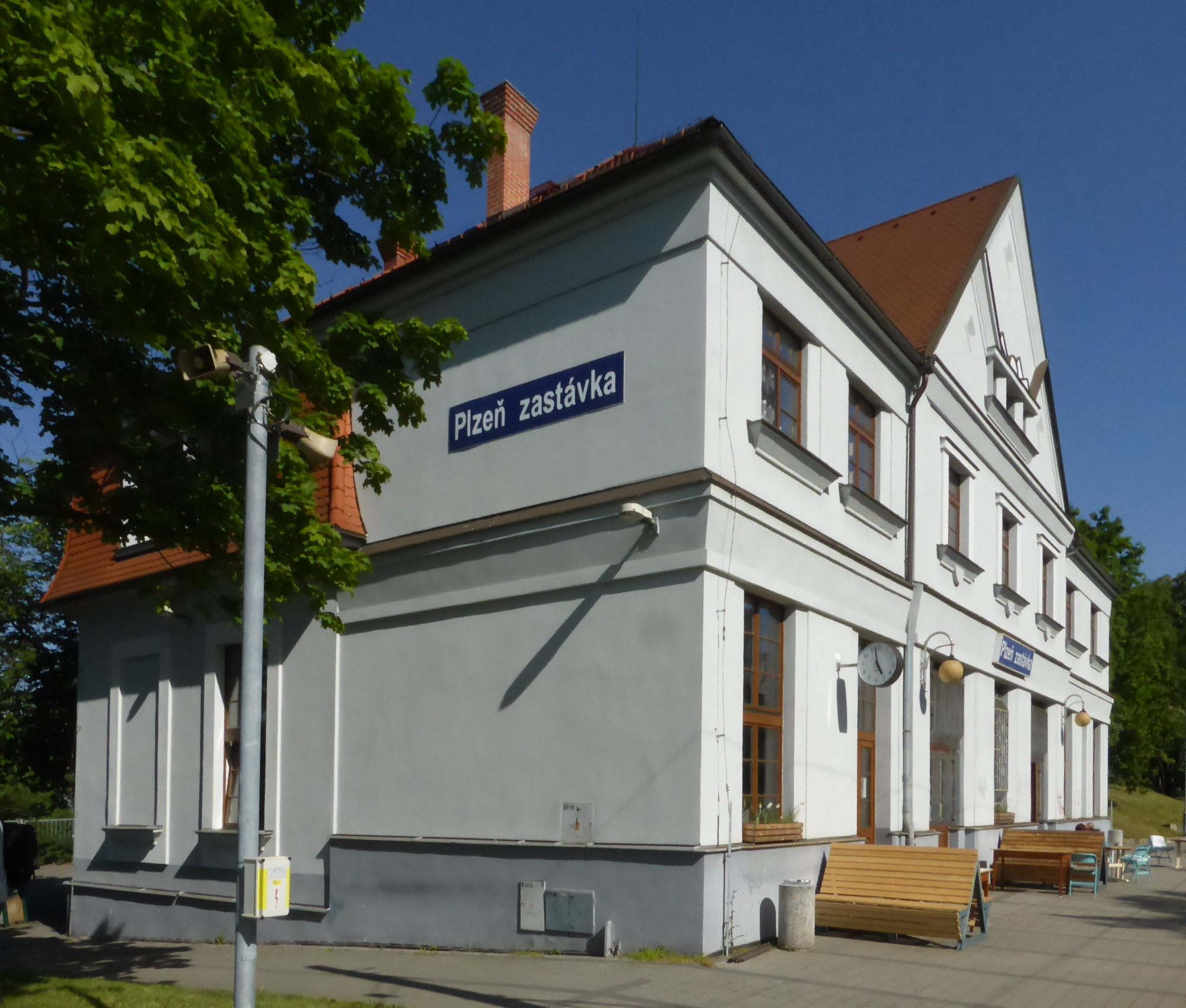 Železniční stanice Plzeň zastávka.